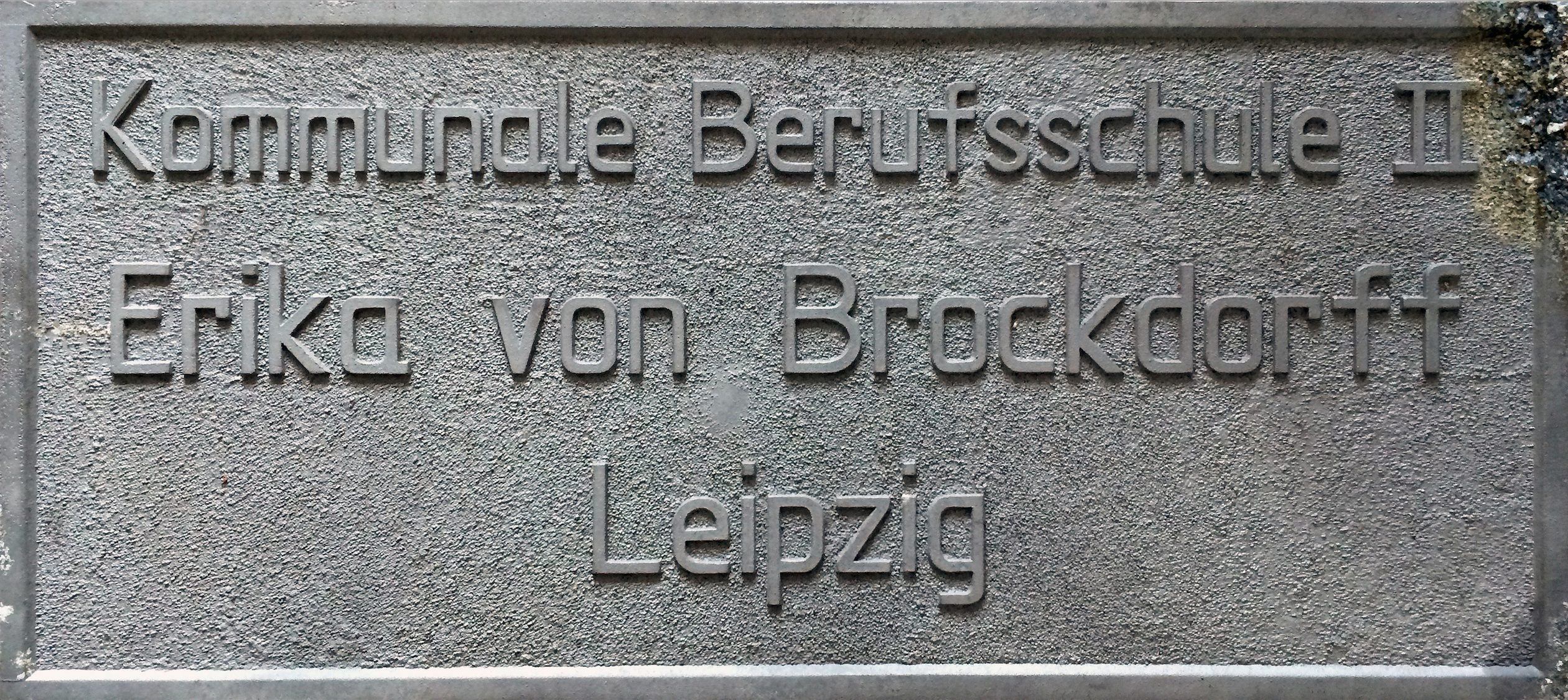 Schulschild KBS II "Erika von Brockdorff" 1987